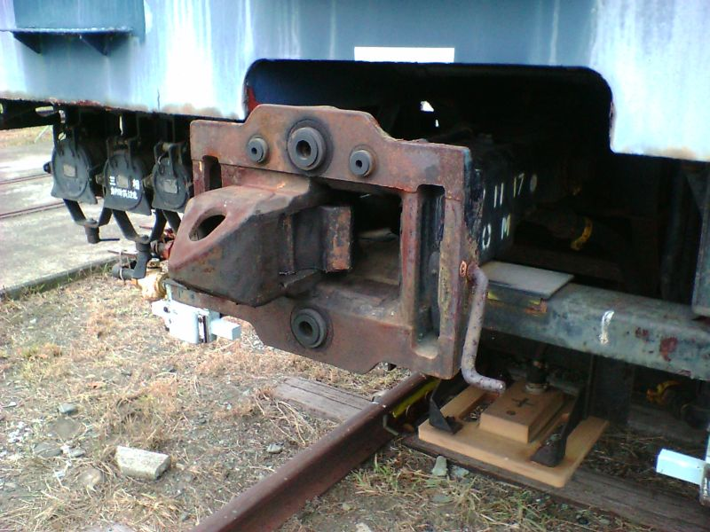 密着連結器 撮影地：JR東日本・鎌倉総合車両センター